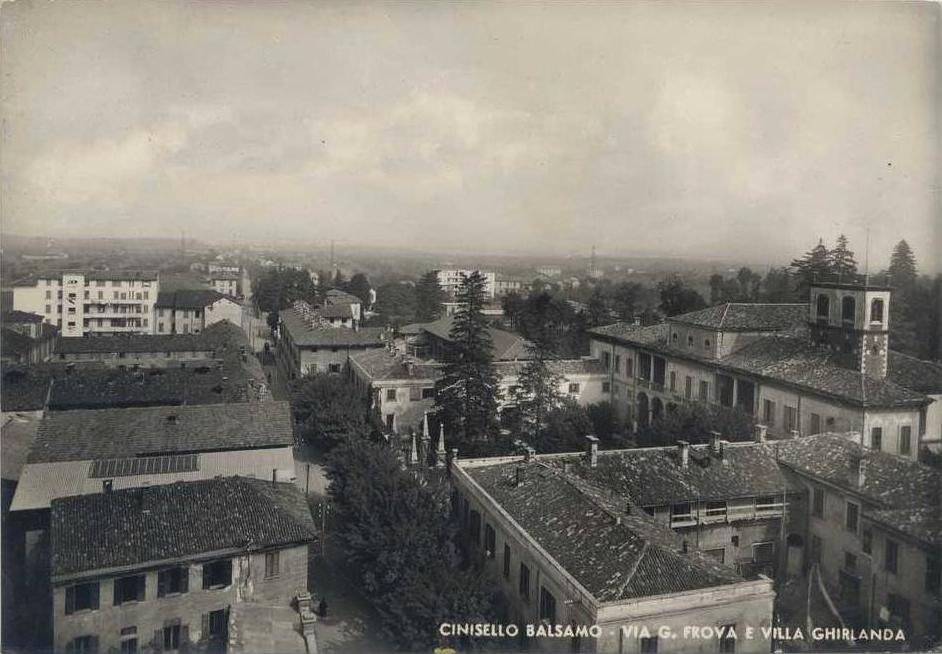 Cinisello Balsamo, il vecchio tessuto edilizio lungo la via Frova, davanti a Villa Ghirlanda Silva.